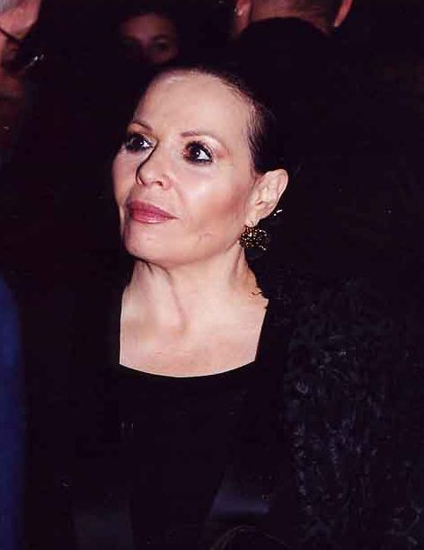 Gila Almagor